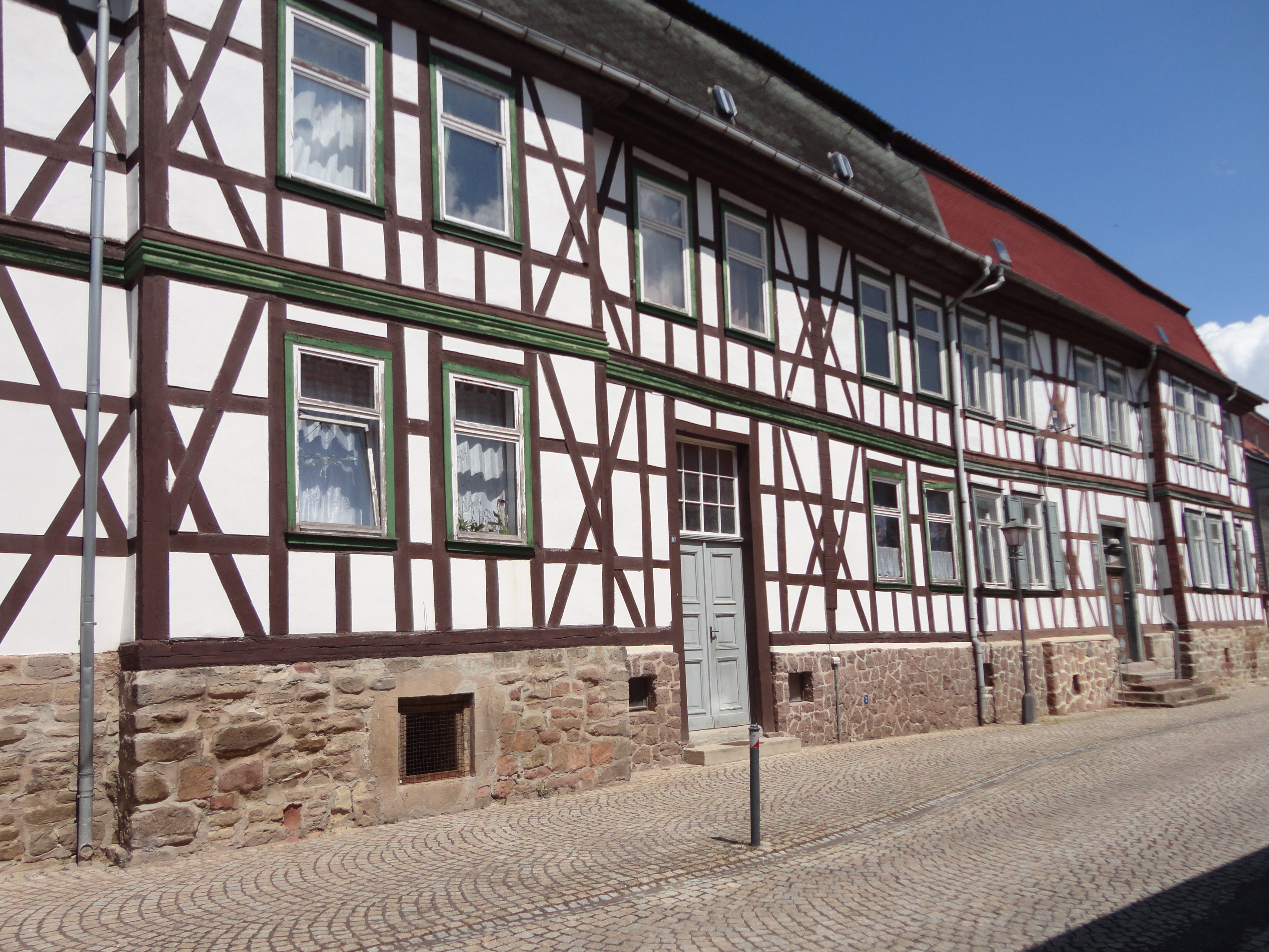 Das ehemalige Stadthaus der Familien Schneidewind, wie Amtmänner und Amtsverwalter in der Stadt Heringen/Helme.